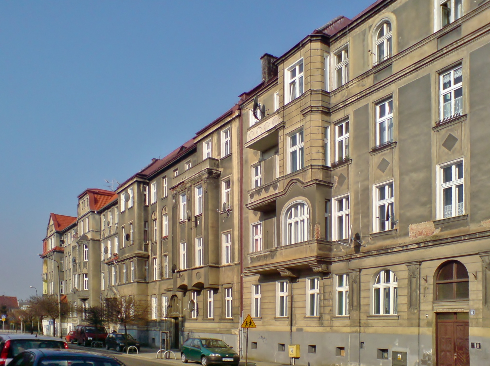 Zabytkowa kamienica przy ulicy Wileńskiej w Raciborzu